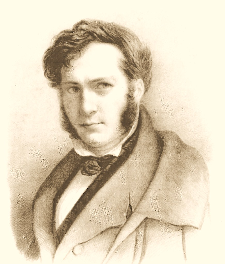 Bonaventure Laurens, autoportrait